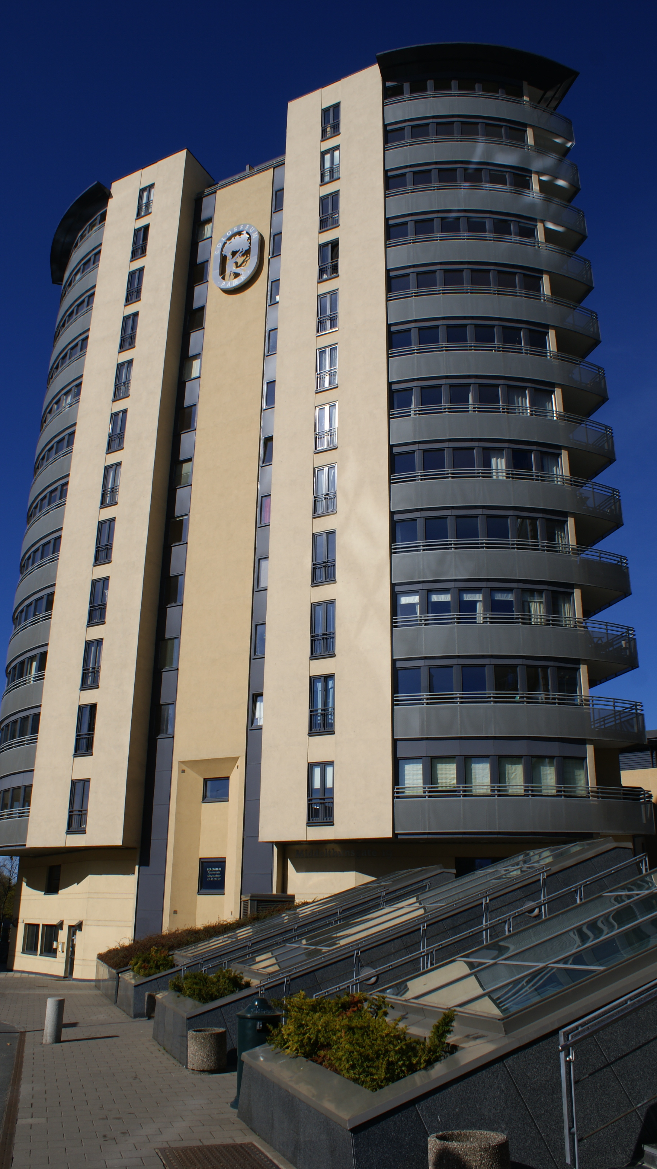 Colosseum Park, Majorstua, Frogner, Oslo, Norway.